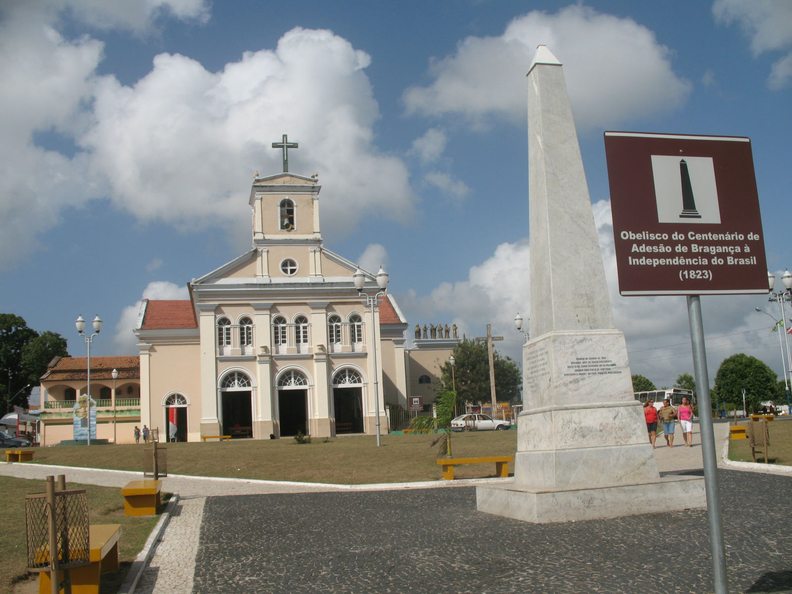 Obelisco do centenário de Adesão de Bragança à Independência do Brasil (1823) e Catedral de Nossa Senhora do Rosário na Praça da Catedral de Nossa Senhora do Rosário em Bragança - Pará - Brasil.